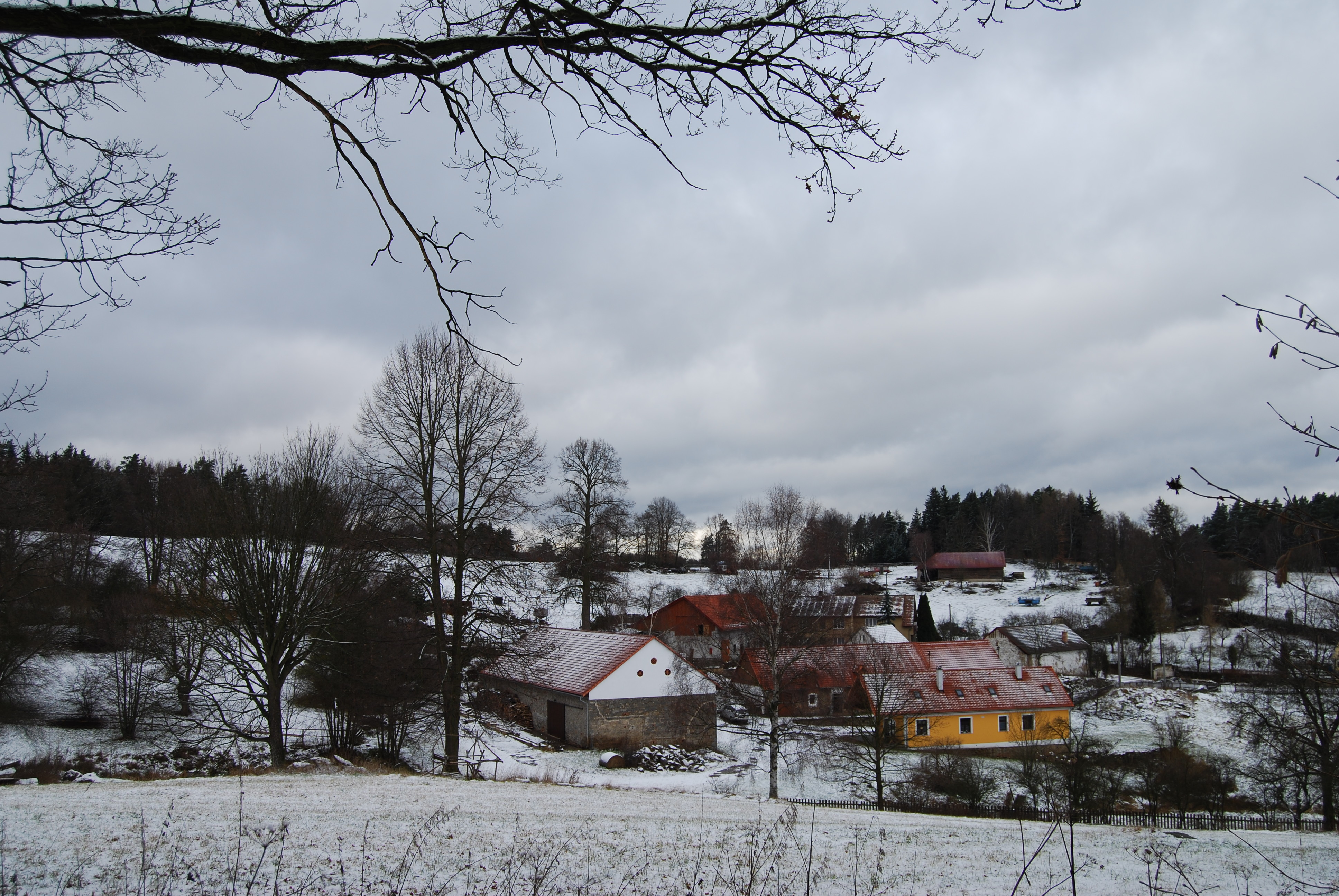 Pohled na obec. Mašov je malá vesnice, část obce Petrovice v okrese Příbram. Česká republika.